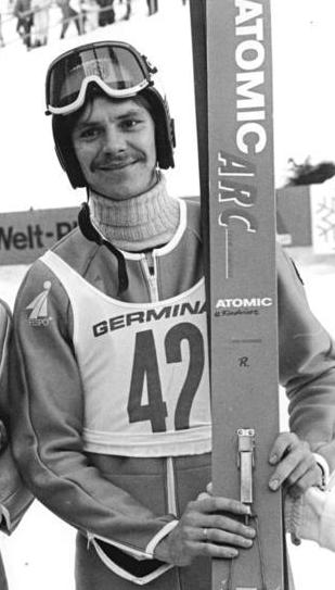 Ulf Findeisen